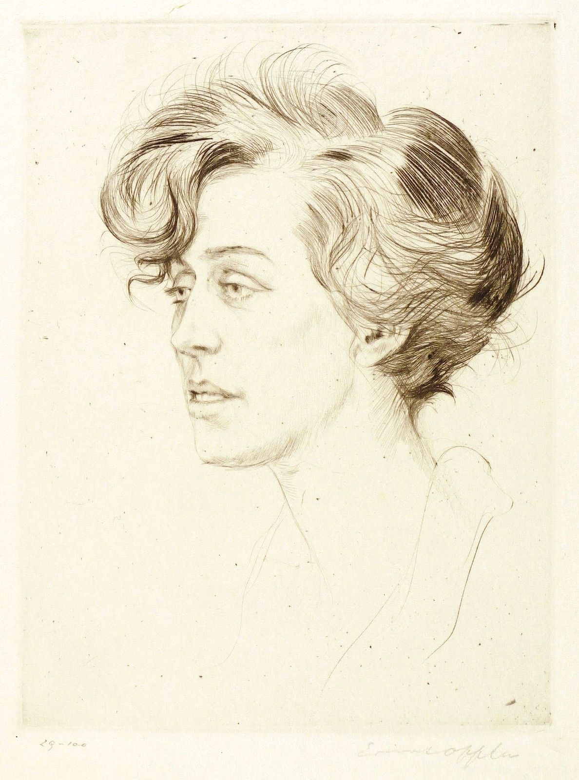 "Nadja Kopf / VIII/1", Kaltnadelradierung von Ernst Oppler, Maße :20,9 x 15,9 cm (Darstellung / Platte) / 28 x 22,5 cm (Blatt)